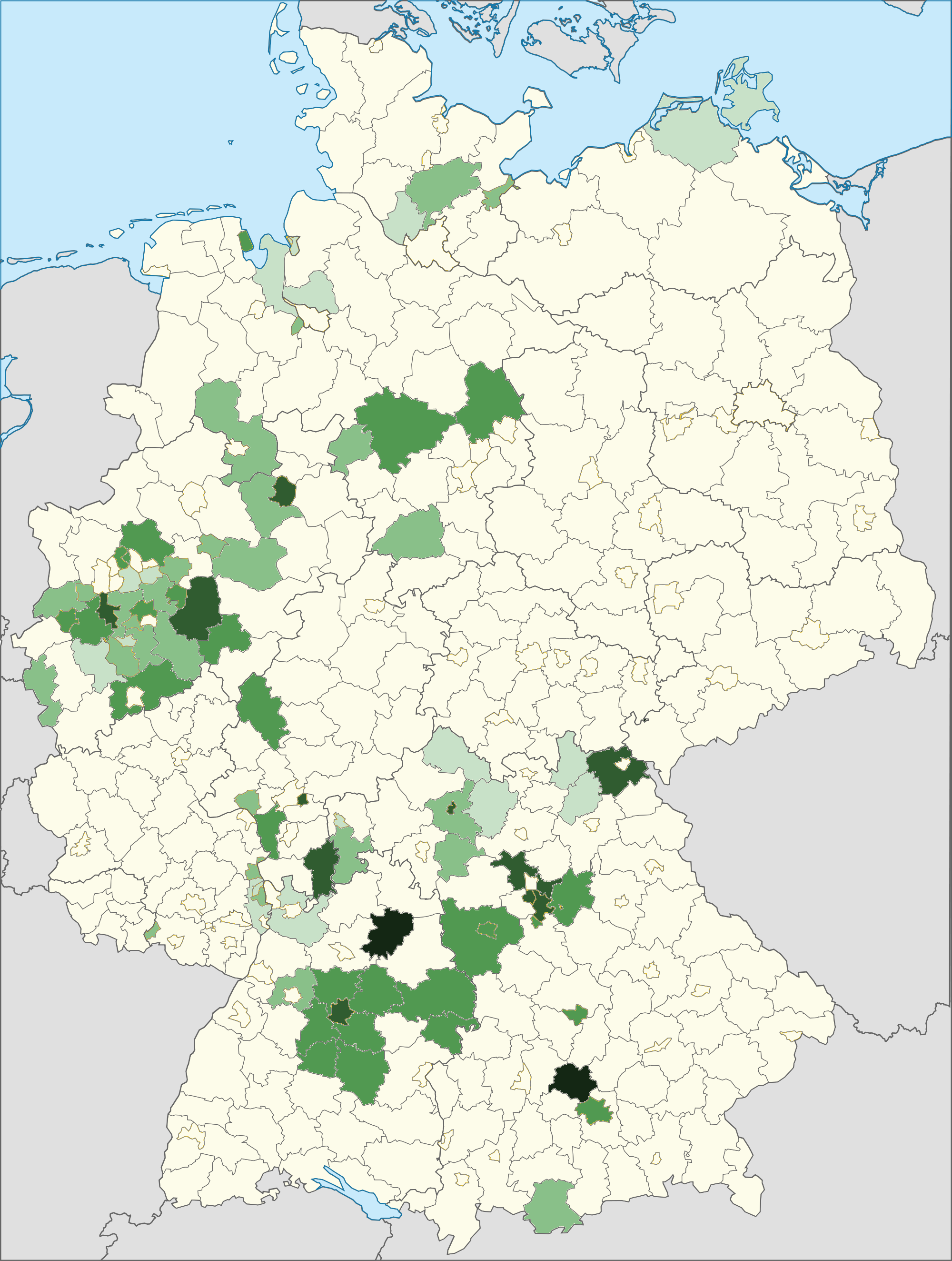 Karte der Personen mit griechischer Staatsangehörigkeit und deren relativer Häufigkeit in den Landkreisen 2014. Dunkelgrün: häufigste ausländische Staatsangehörigkeit in diesem Kreis, hellgrün: fünfthäufigste ausländische Staatsangehörigkeit in diesem Kreis, weiß: sechsthäufig oder weniger. Quelle: Ausländerzentralregister, Stand 31. Dezember 2014. Saarland: keine Daten auf Kreisebene (dargestellt ist die Landesebene). Deutschlandweite relative Häufigkeit der ausländischen Staatsangehörigkeit Griechenland: Platz 5.